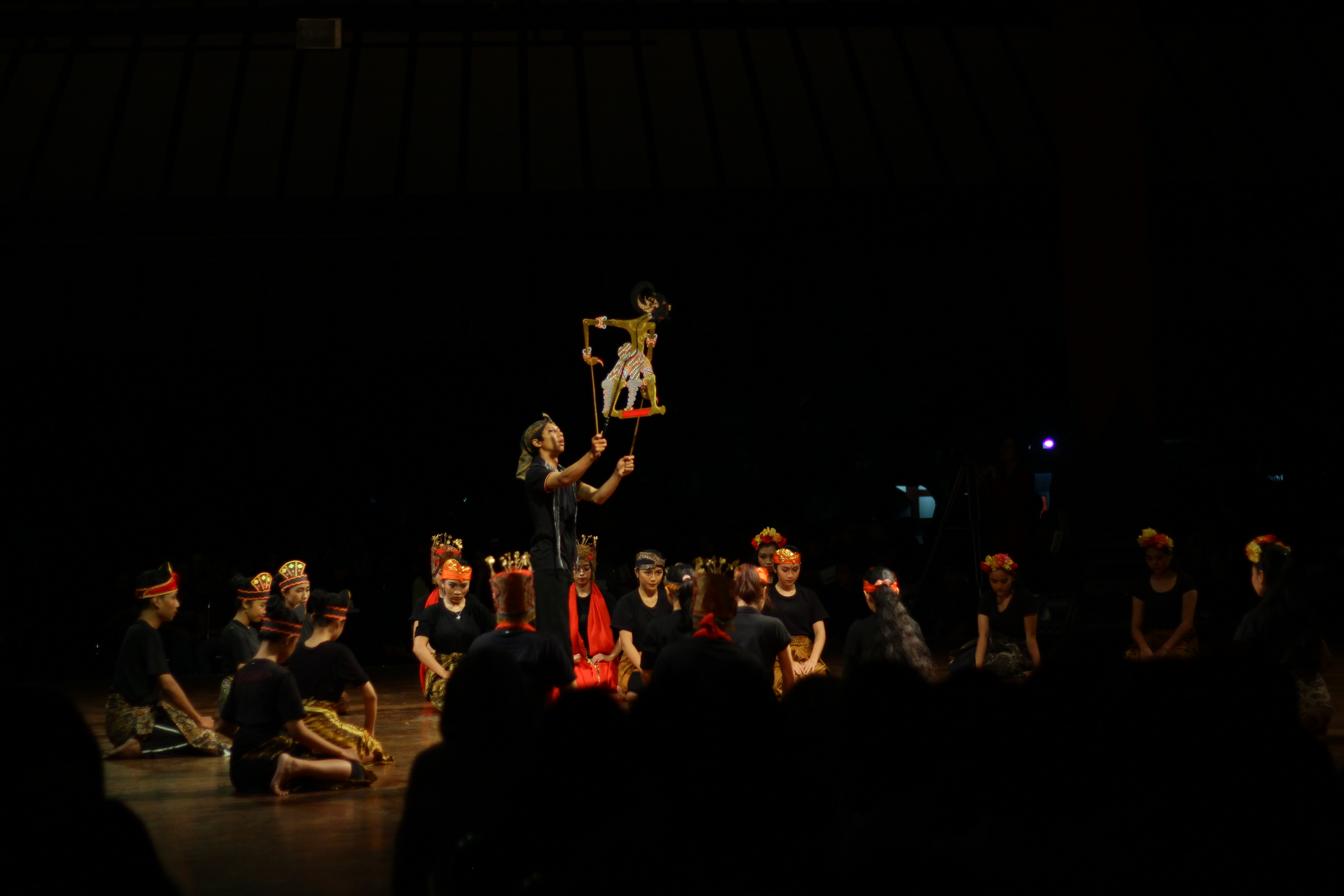 menceritakan tentang bagaimana seorang dalang yang sedang menceritakan pewayangan werkudara kepada para audiensi